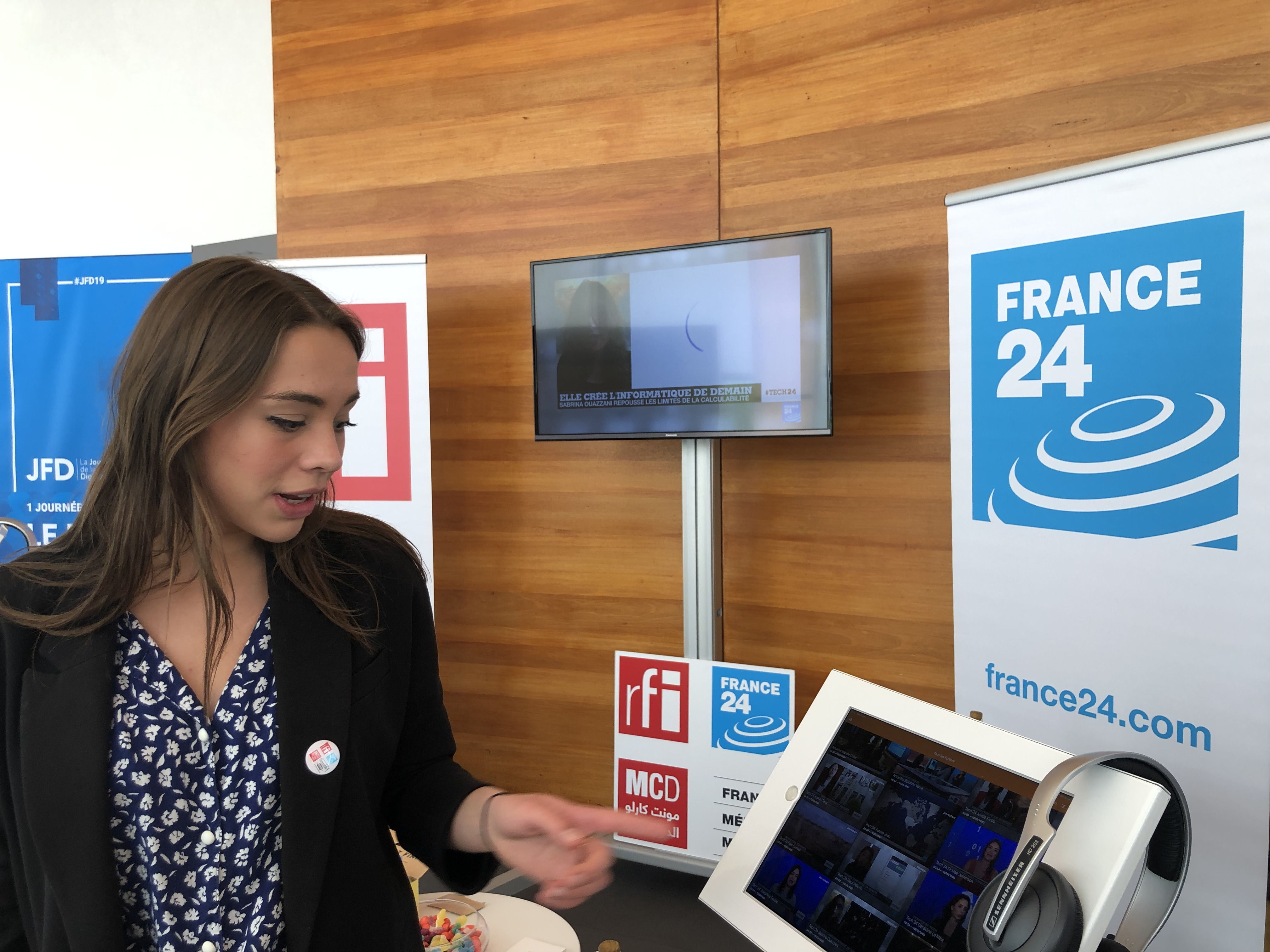 JFD19 journée de la femme digitale Paris 2019